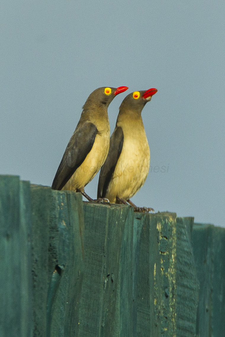 Red-billed Oxpecker - Kenya_S4E7722